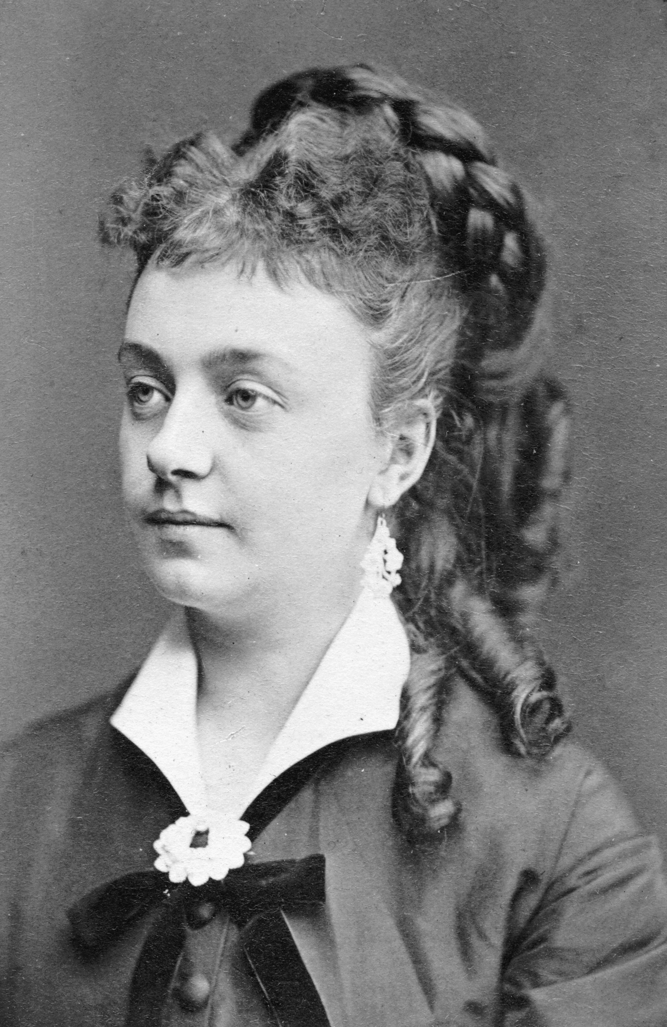 Lotten Hellander, skådespelare vid Nya teatern 1875